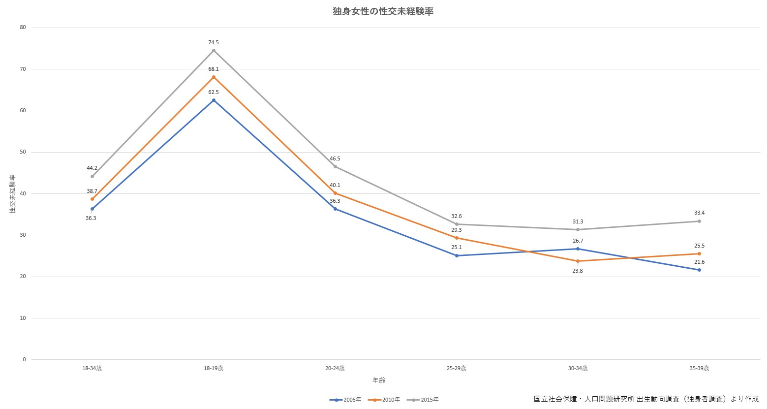 国立社会保障・人口問題研究所 出生動向調査より作成